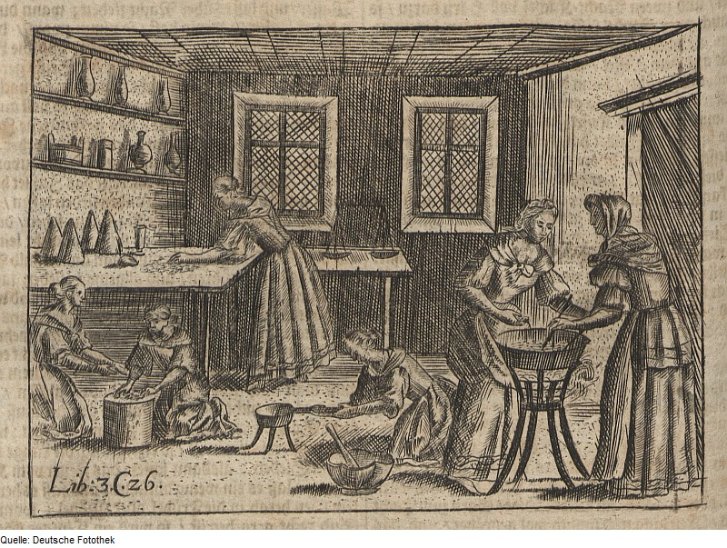 Original image description from the Deutsche Fotothek Landwirtschaft & Verarbeitung & Obst